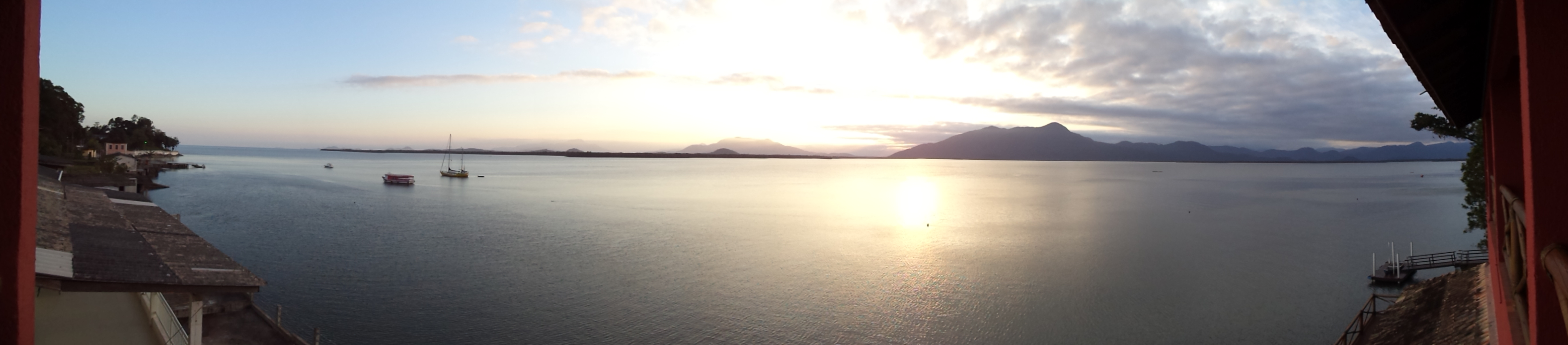 Pôr do Sol na Baía das Laranjeiras em Guaraqueçaba - Paraná